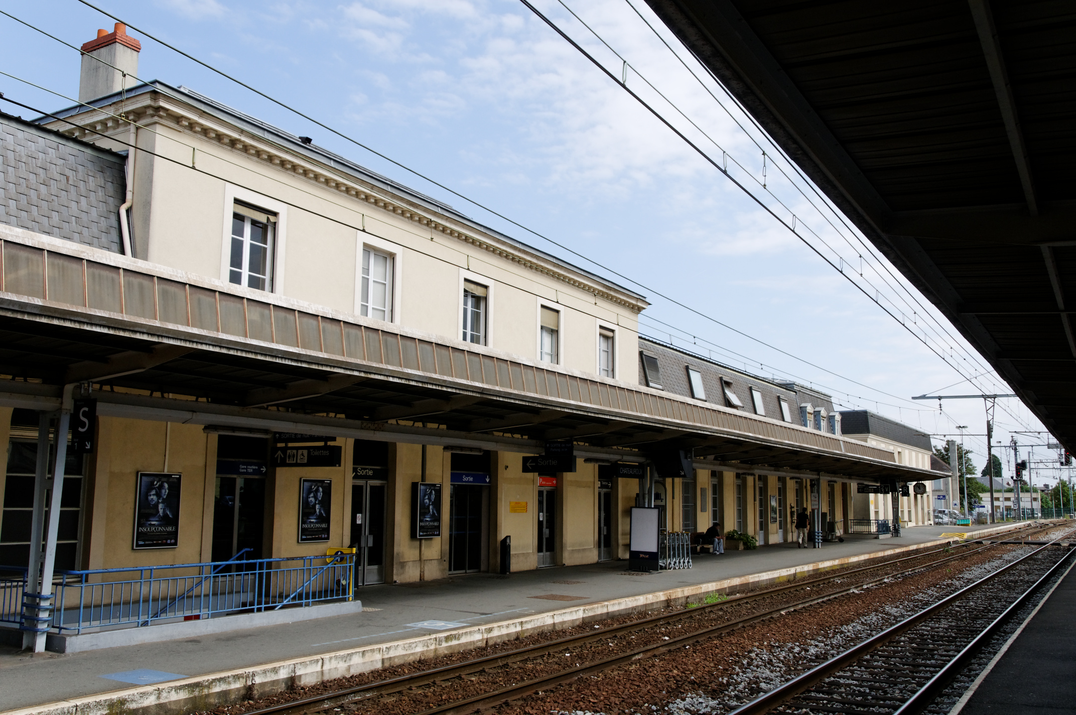 Gare de Châteauroux, Indre, France